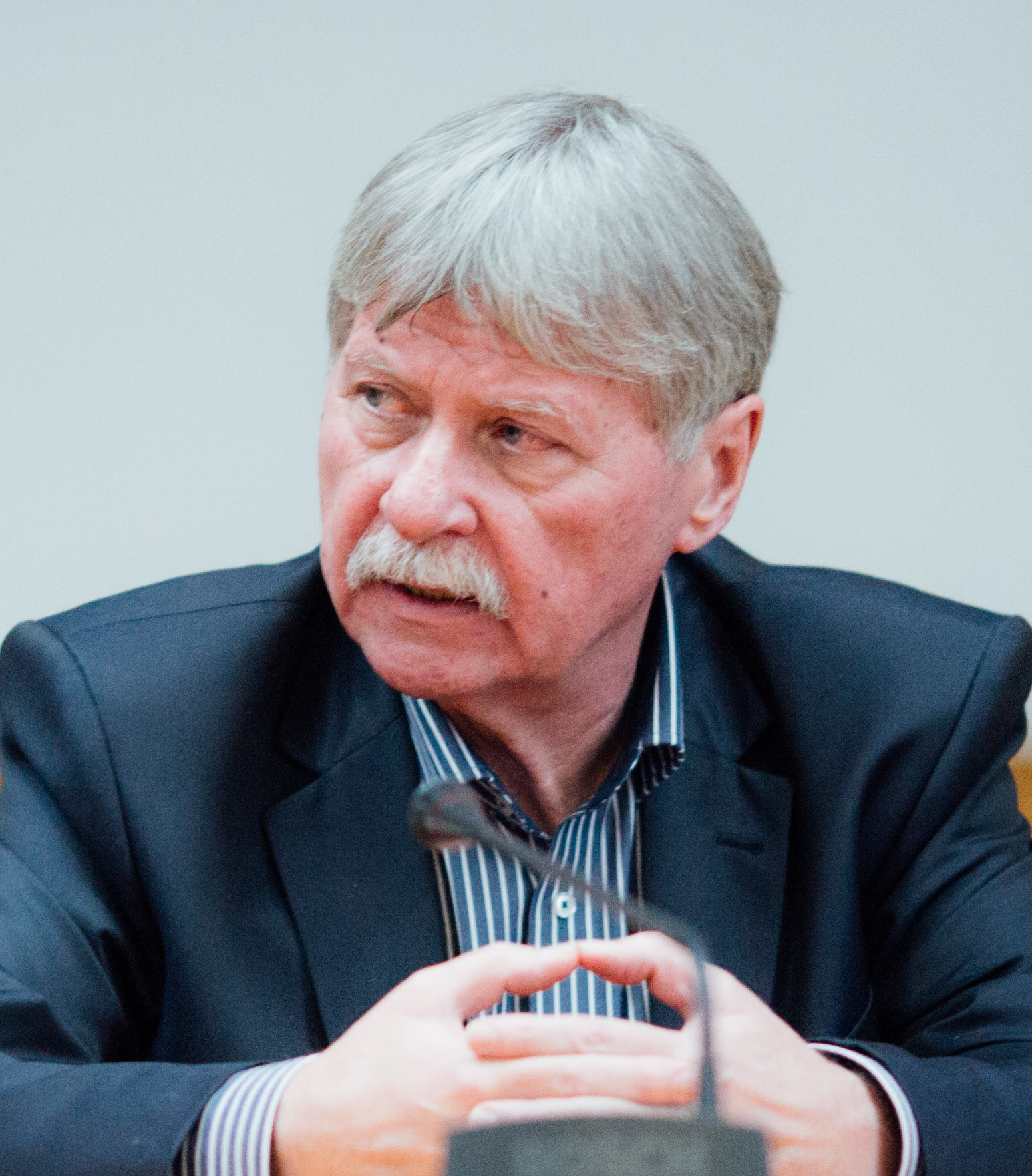 Verestóy Attila